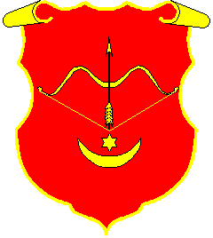 Герб Старокостянтинова періоду Речі Посполитої